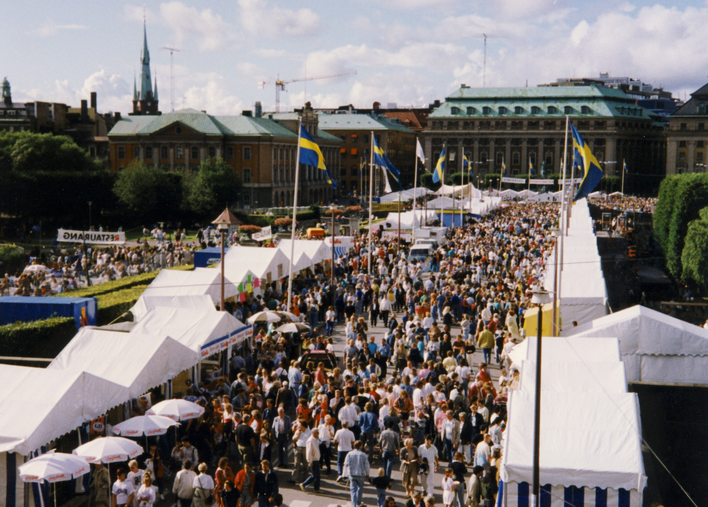 Stockholms vattenfestival, fest på Norrbro